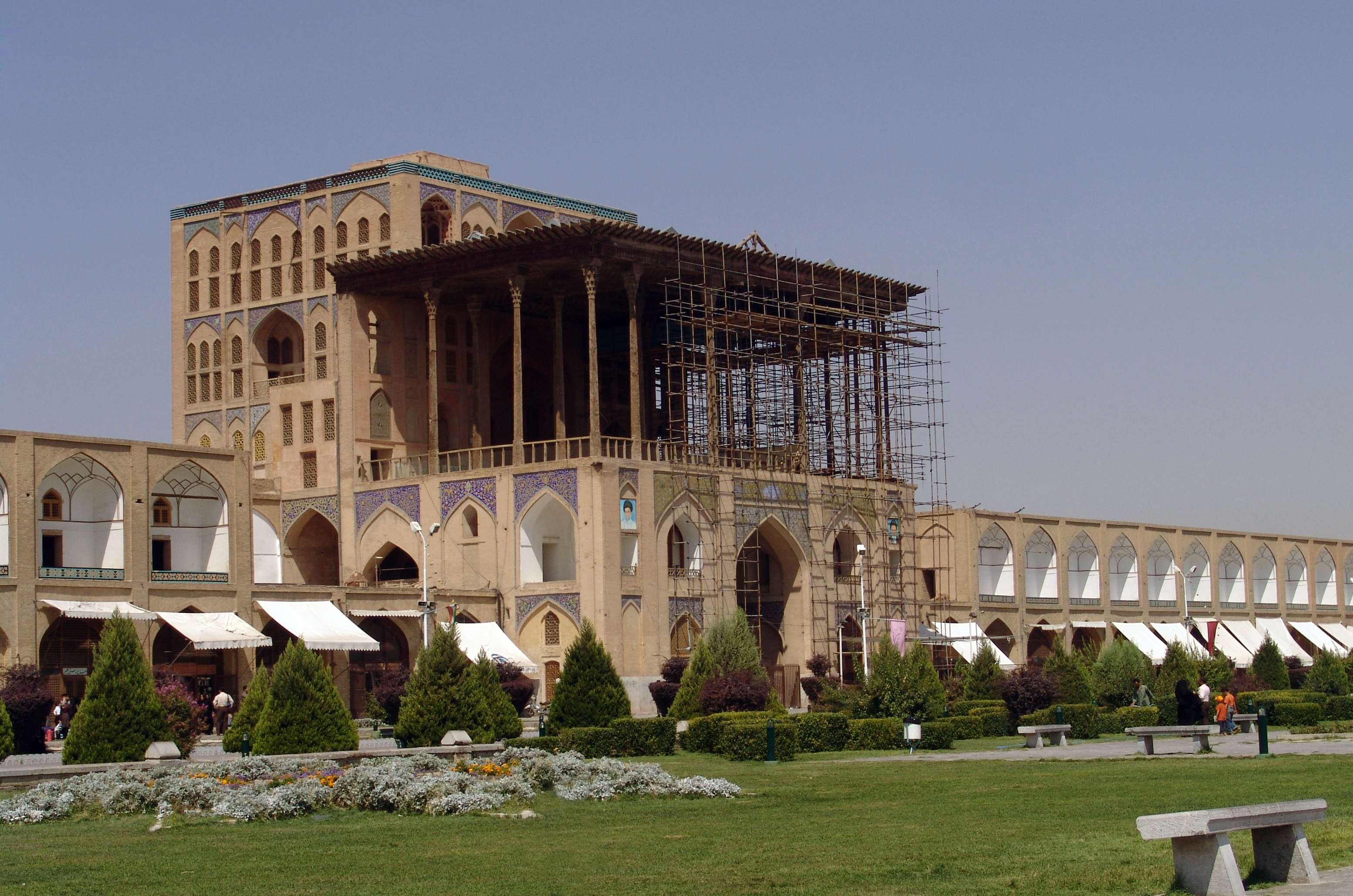 عالی‌قاپو در میدان امام اصفهان